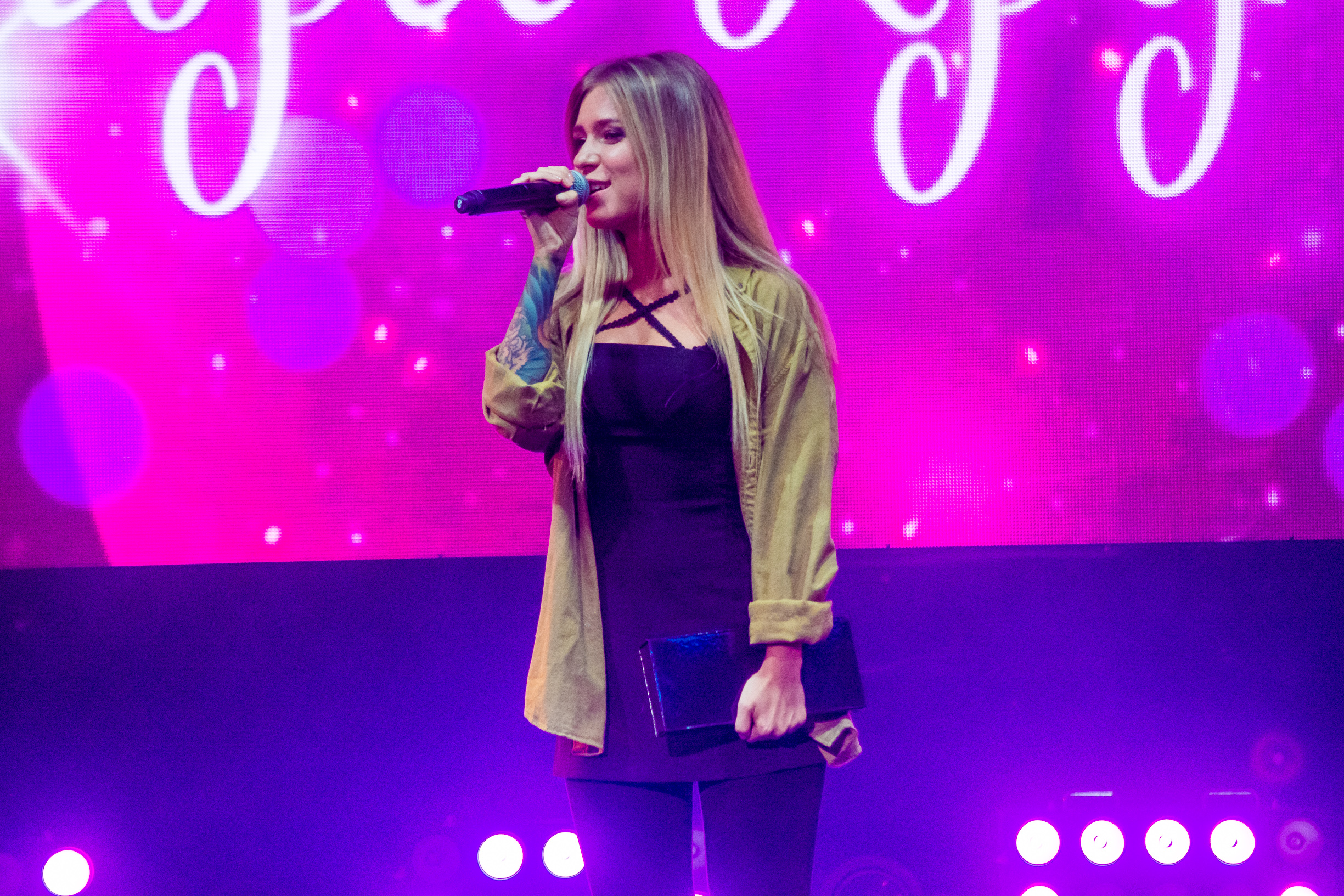 Рита Дакота на Девичнике Teens 2017